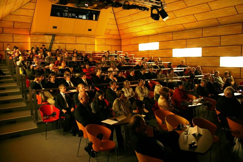 Braunauer Zeitgeschichte-Tage in "Kulturhaus Gugg" in Braunau am Inn.